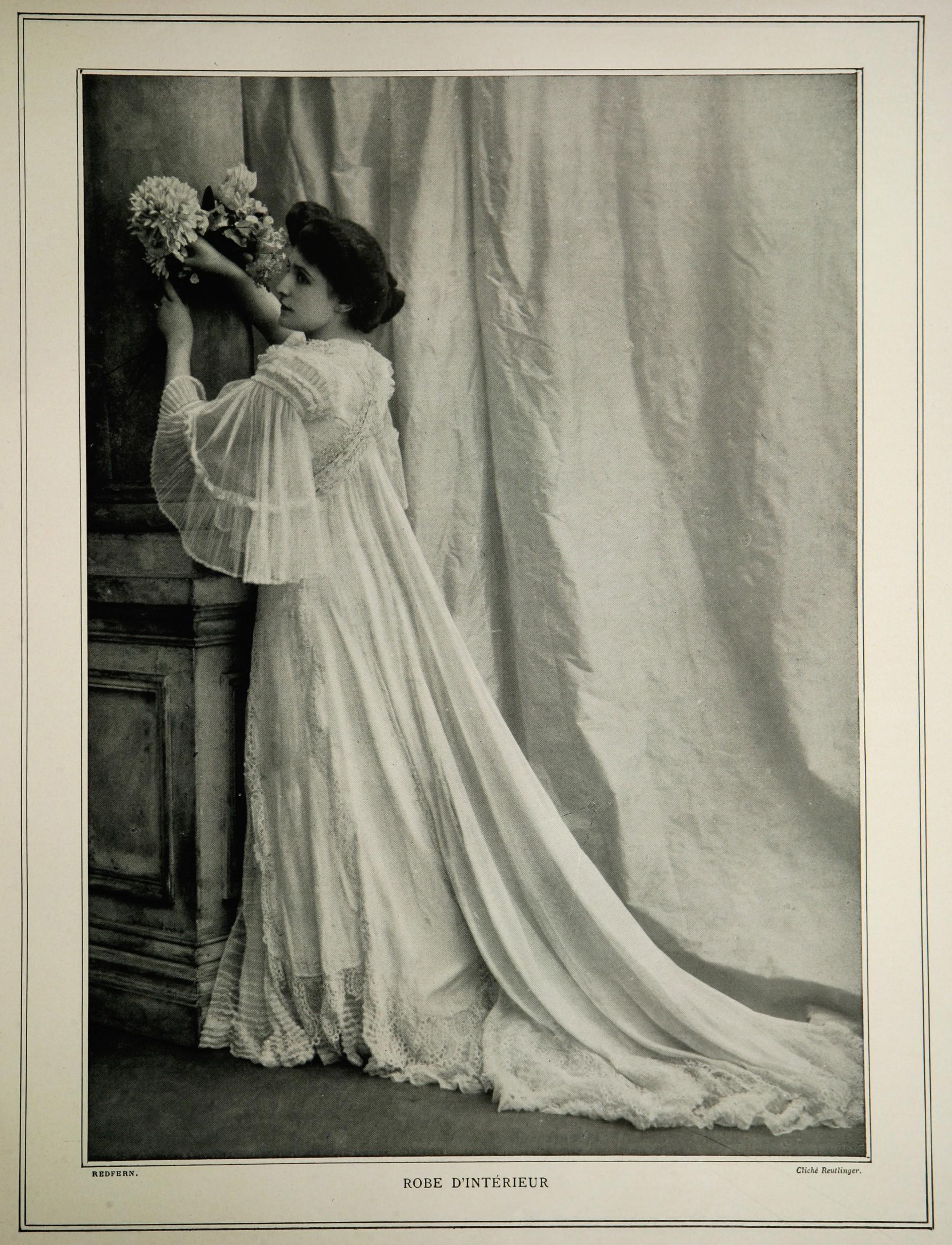 "Robe en crêpe de chine avec incrustation d'angleterre ; devant en tulle plissé ; ceinture liberty brodée de perles fines." Photograph in Les Modes : Revue mensuelle illustrée des arts décoratifs appliqués à la femme.